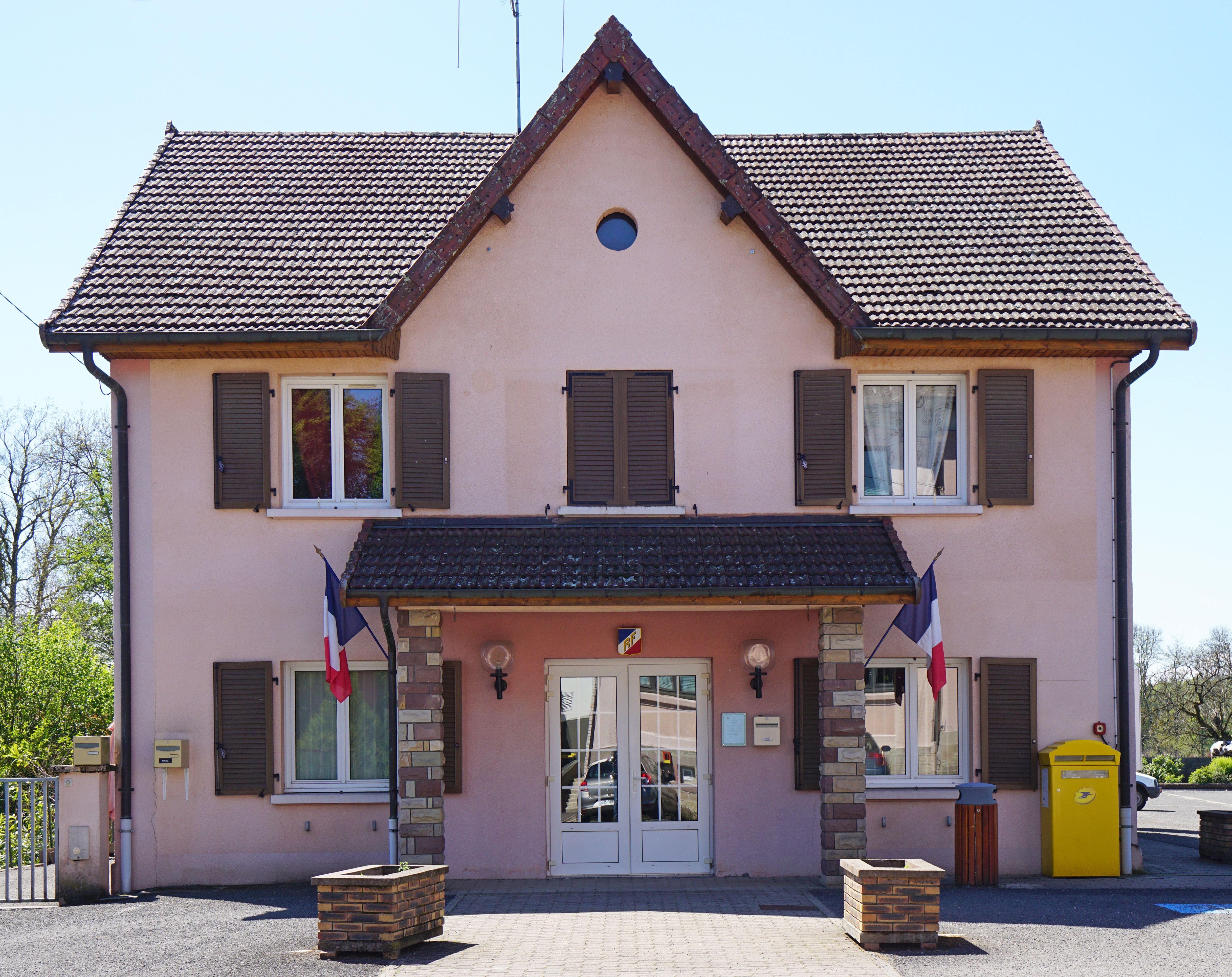 La maire de La Côte (Haute-Saône).